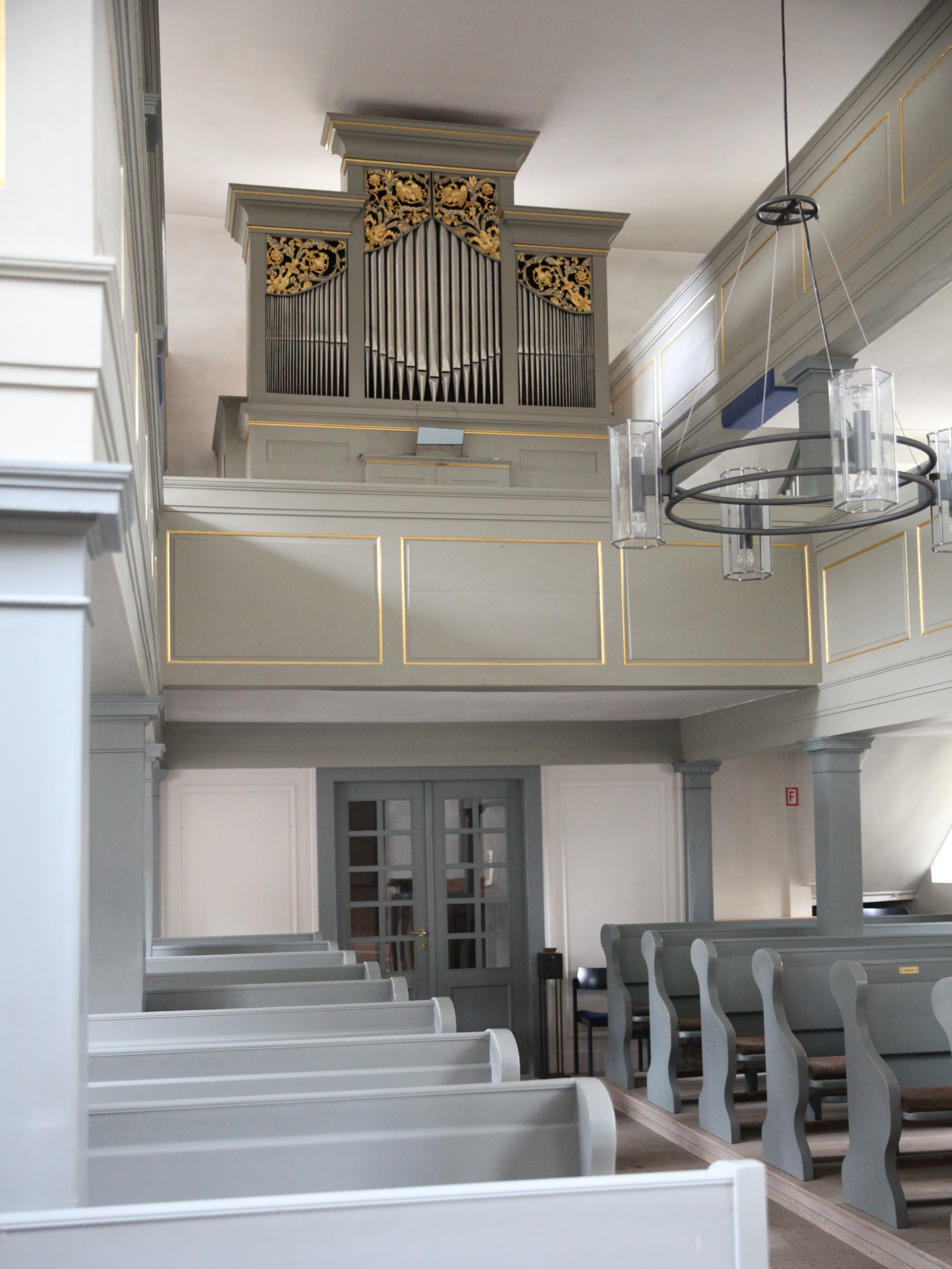 Evangelisch-lutherische Pfarrkirche in Scheuerfeld, Coburg